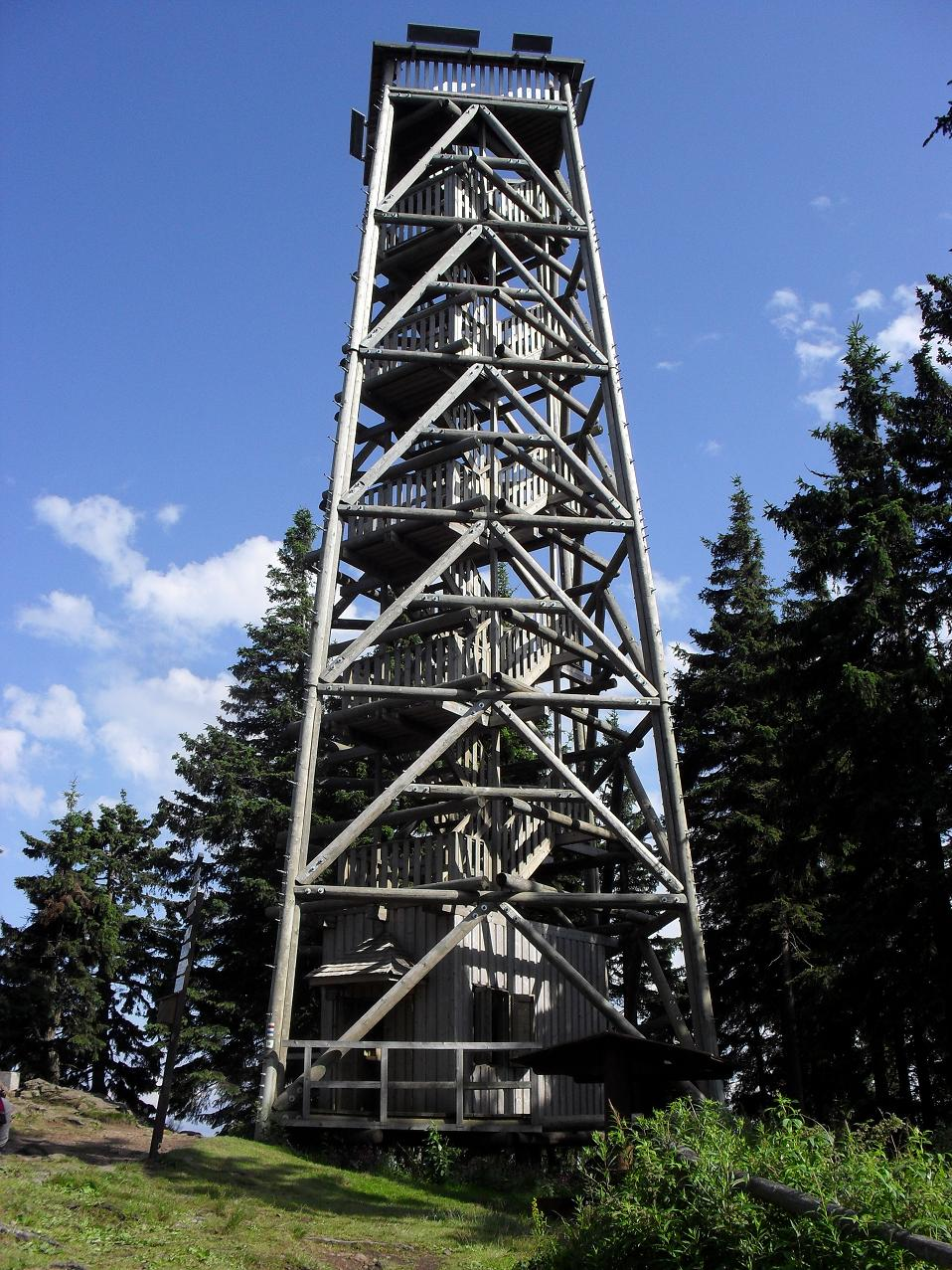 Boubínská rozhledna